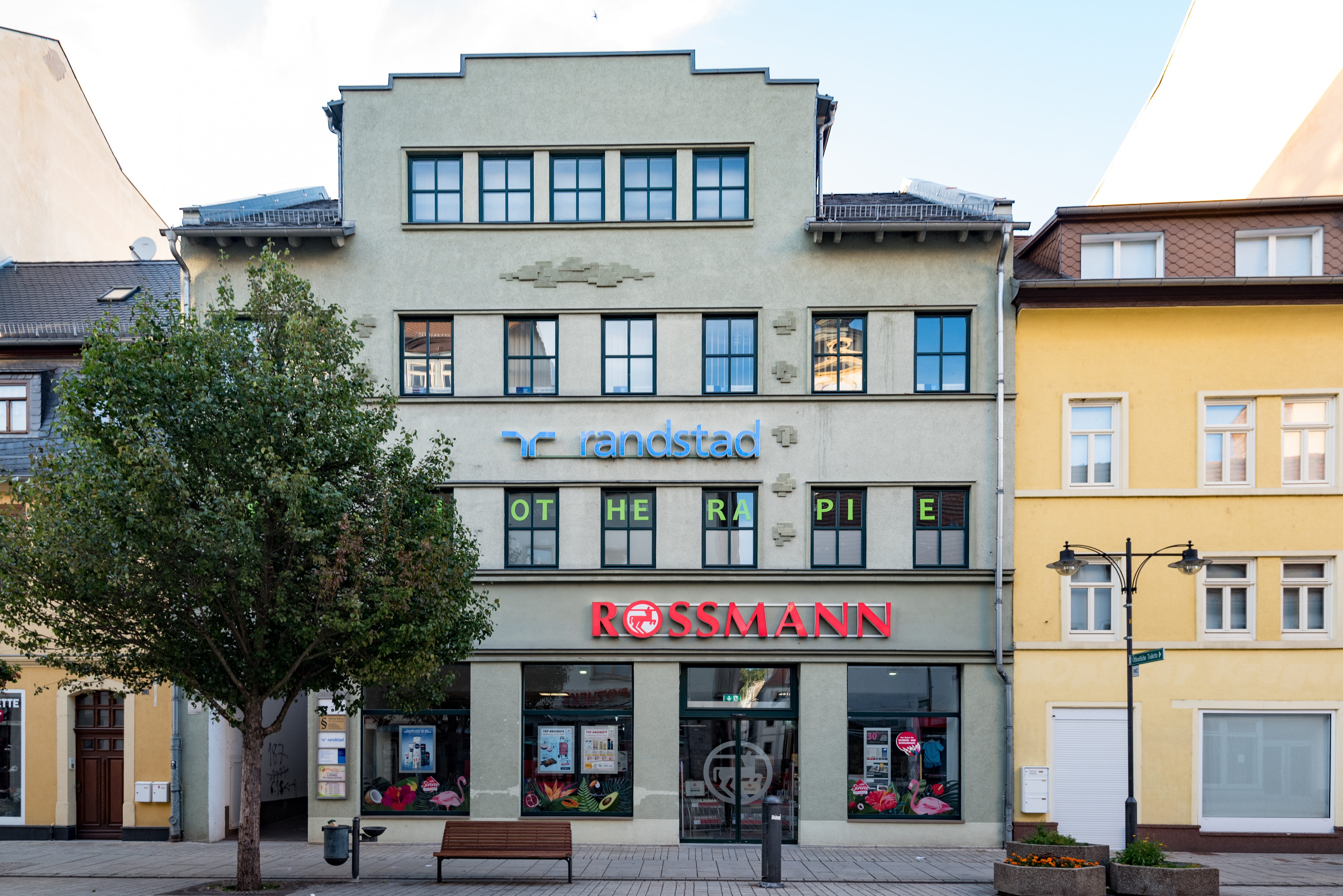 Weißenfels, Jüdenstraße 9